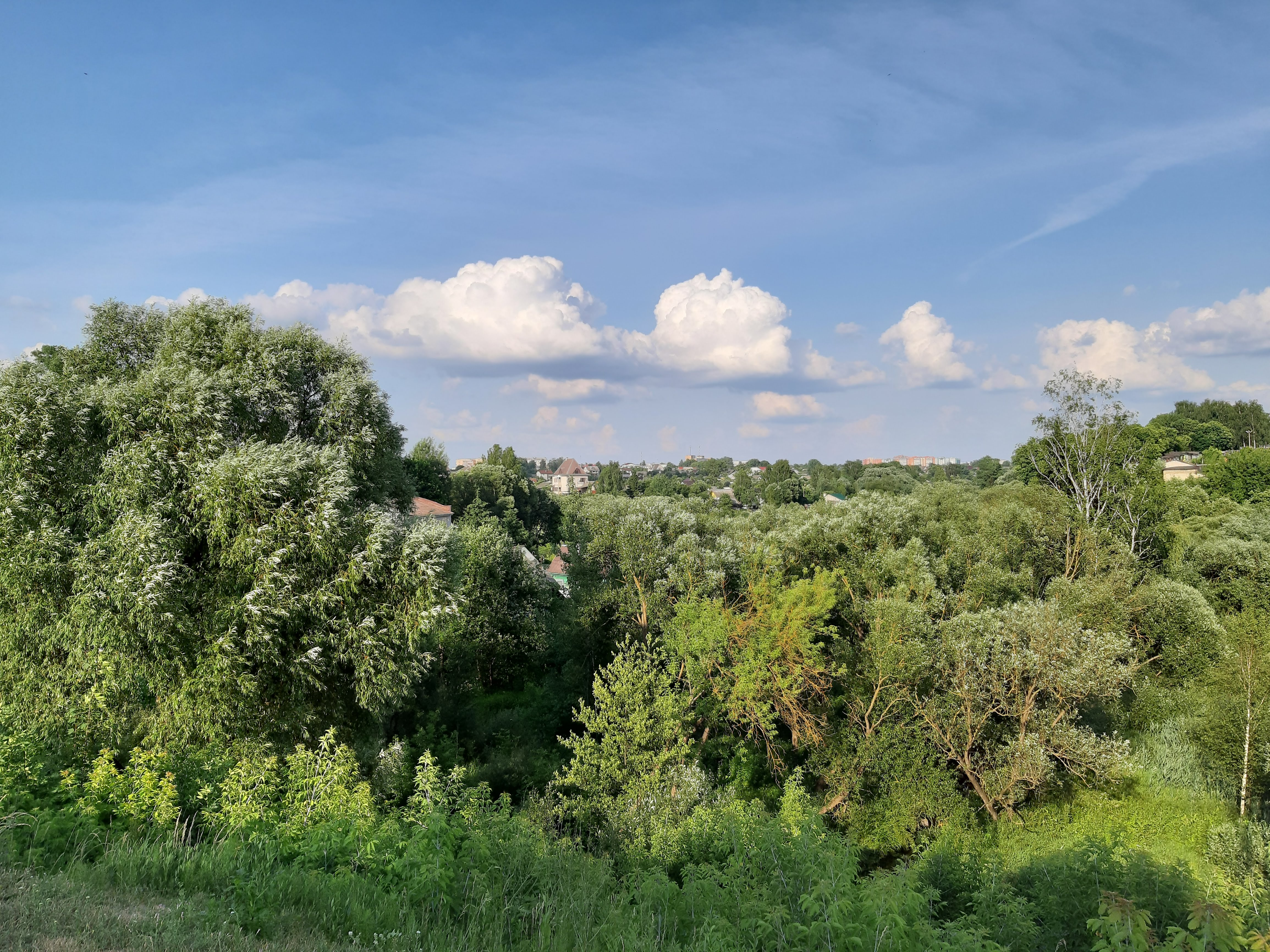 Магілёў. Вуліца Сурганава